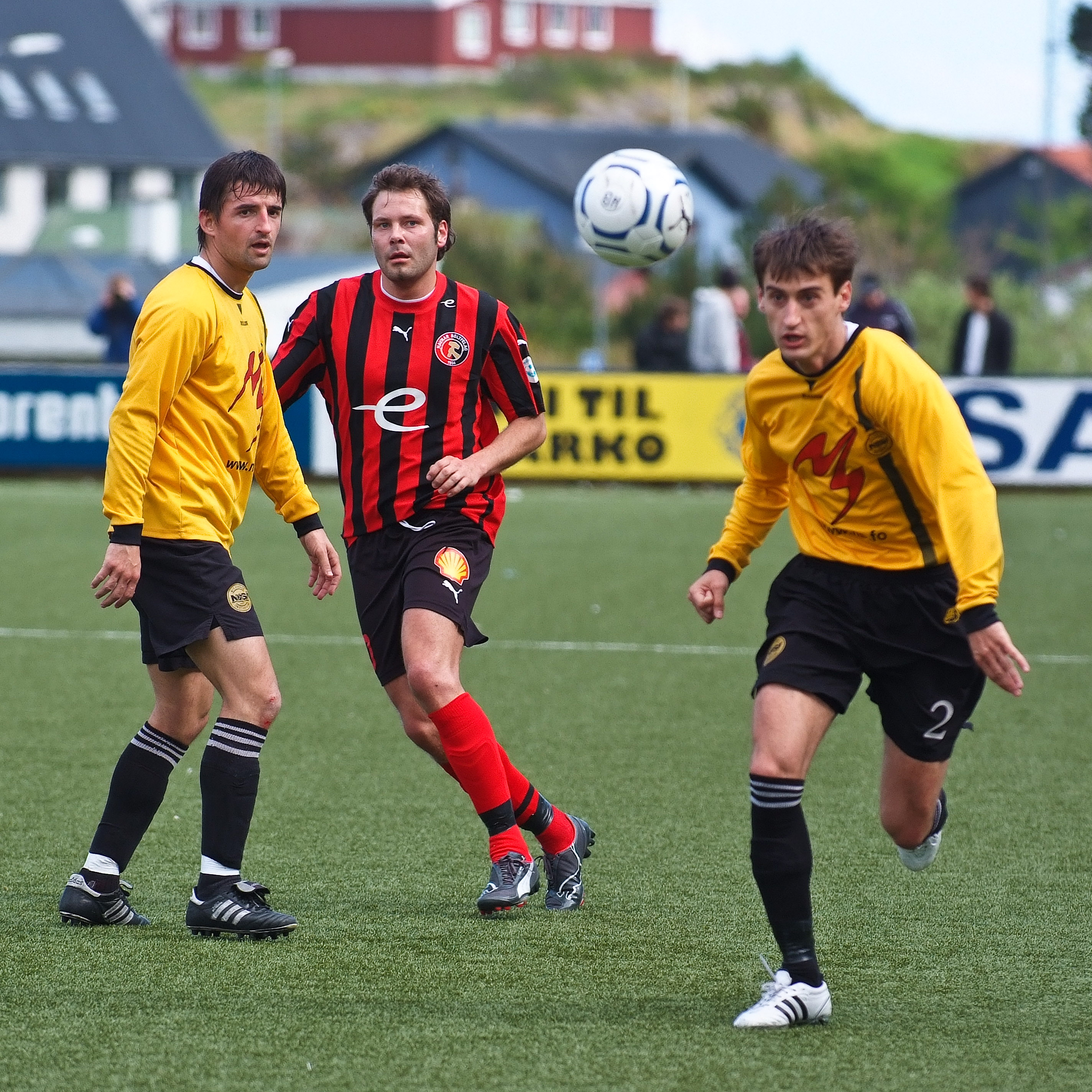 Andrew av Fløtum (HB)